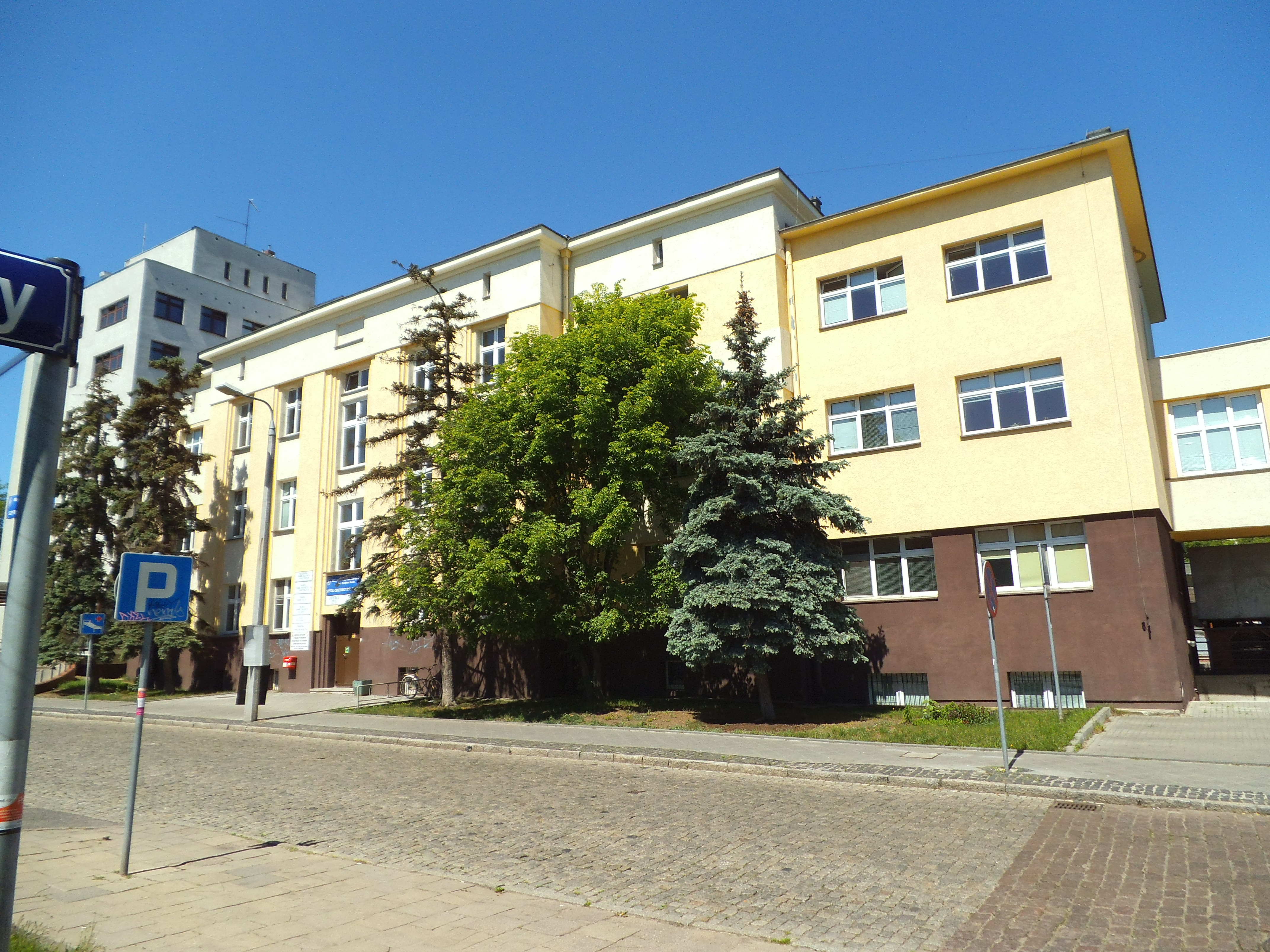 Przychodnia Chorób Zakaźnych i Pasożytniczych w Toruniu66